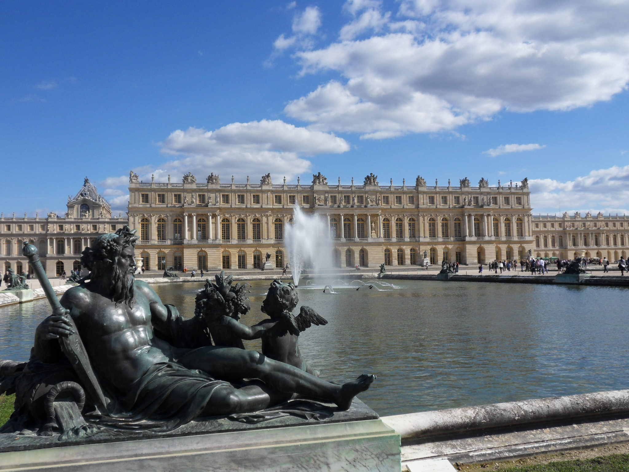 Étienne Le Hongre (Français, 1628-1690): Le Parterre d’Eau. Décoration du bassin par une statue couchée figurant un fleuve ou une rivière de France : La Loire et le Loiret, Le Rhône et la Saône, La Seine et la Marne, La Garonne et la Dordogne. Ici, La Seine, XVIIe s. Bronze fondu par les frères Keller et placé sur la margelle occidentale du Bassin du Nord du Parterre d'Eau des jardins de Versailles, et façade ouest du château de Versailles